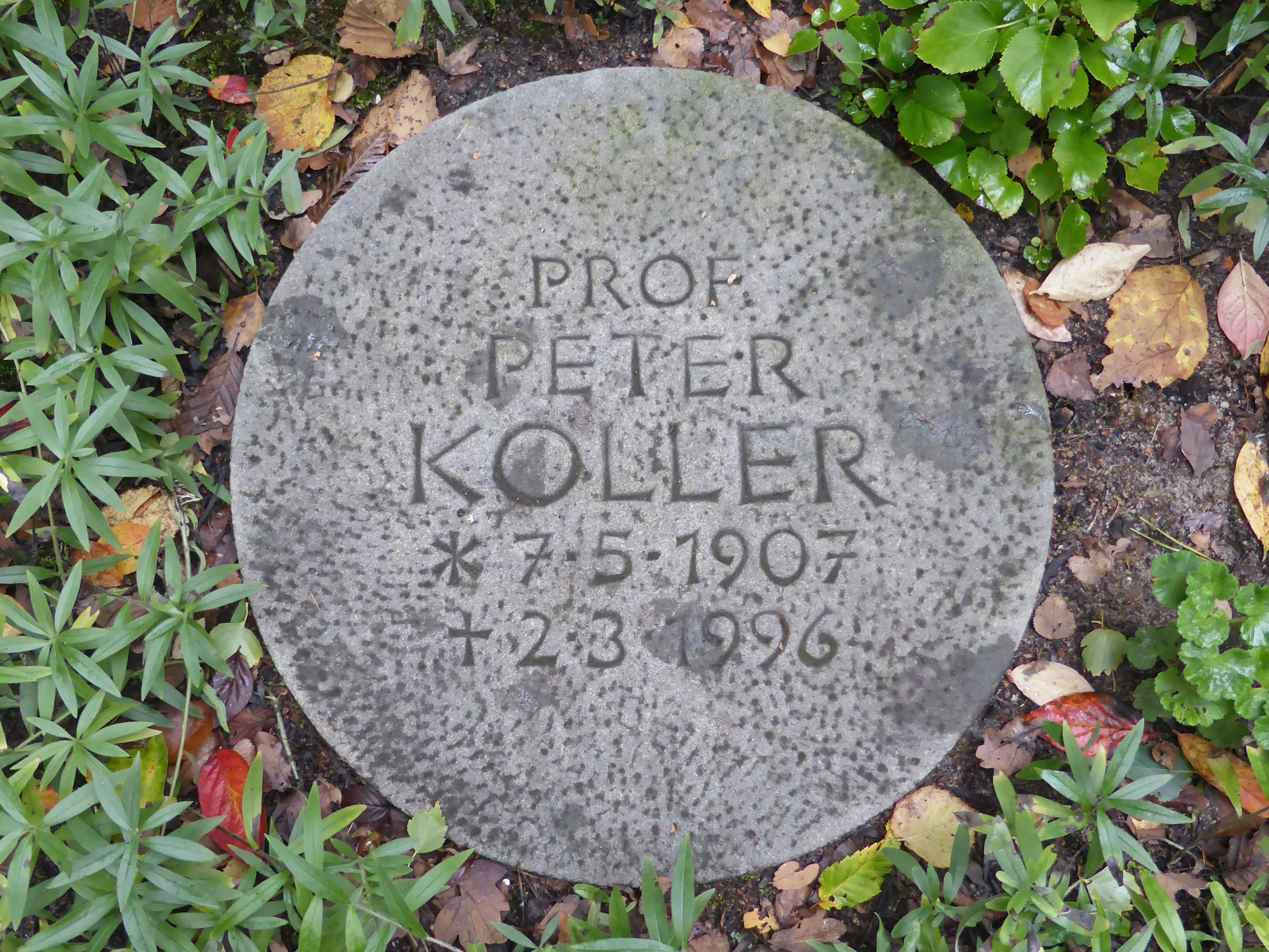 Grabstein von Peter Koller auf dem Waldfriedhof in Wolfsburg.